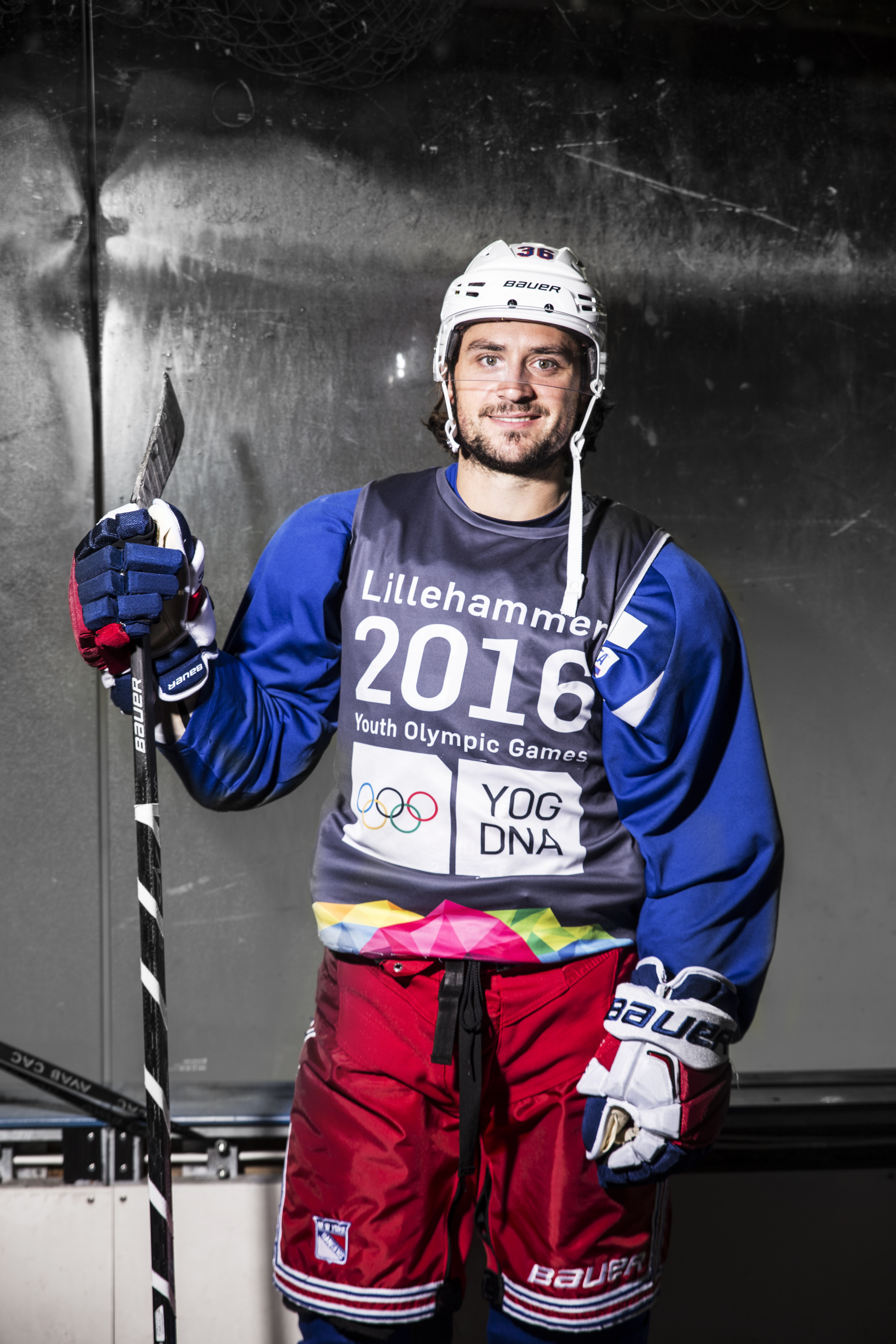 Photo: Trine Merete Olsen